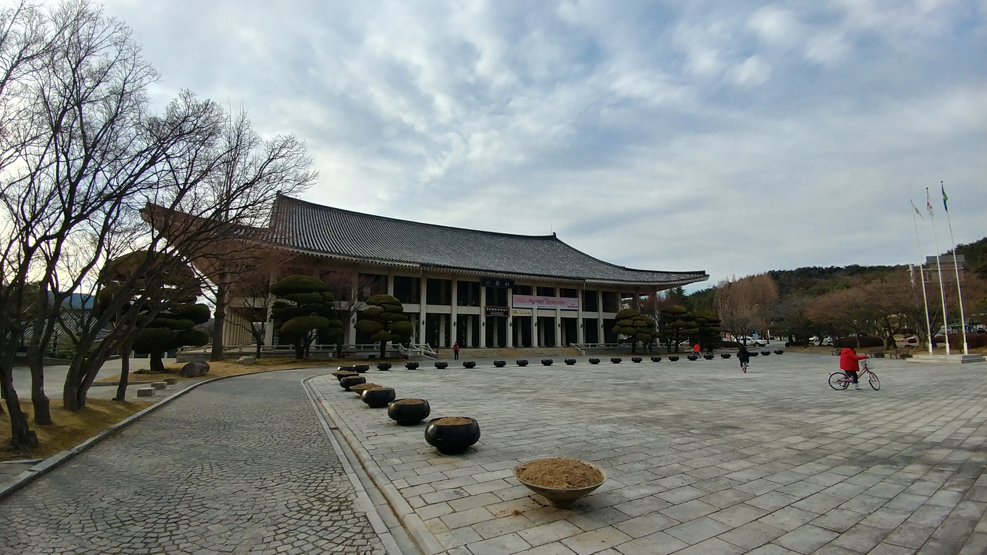 경상남도관광공사